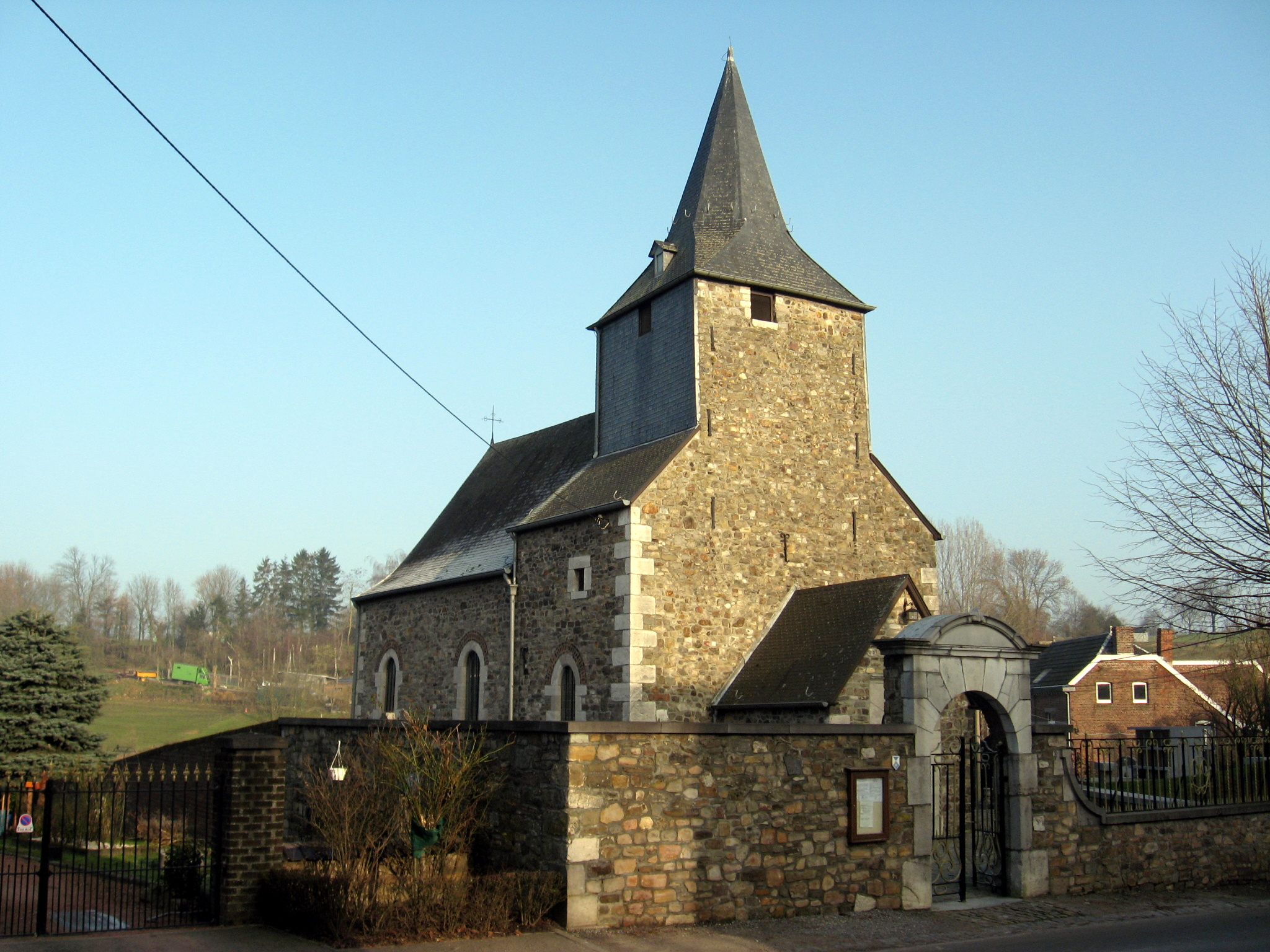 Kapel - hulpkerk Onze-Lieve-Vrouw in Evegnée, Evegnée-Tignée